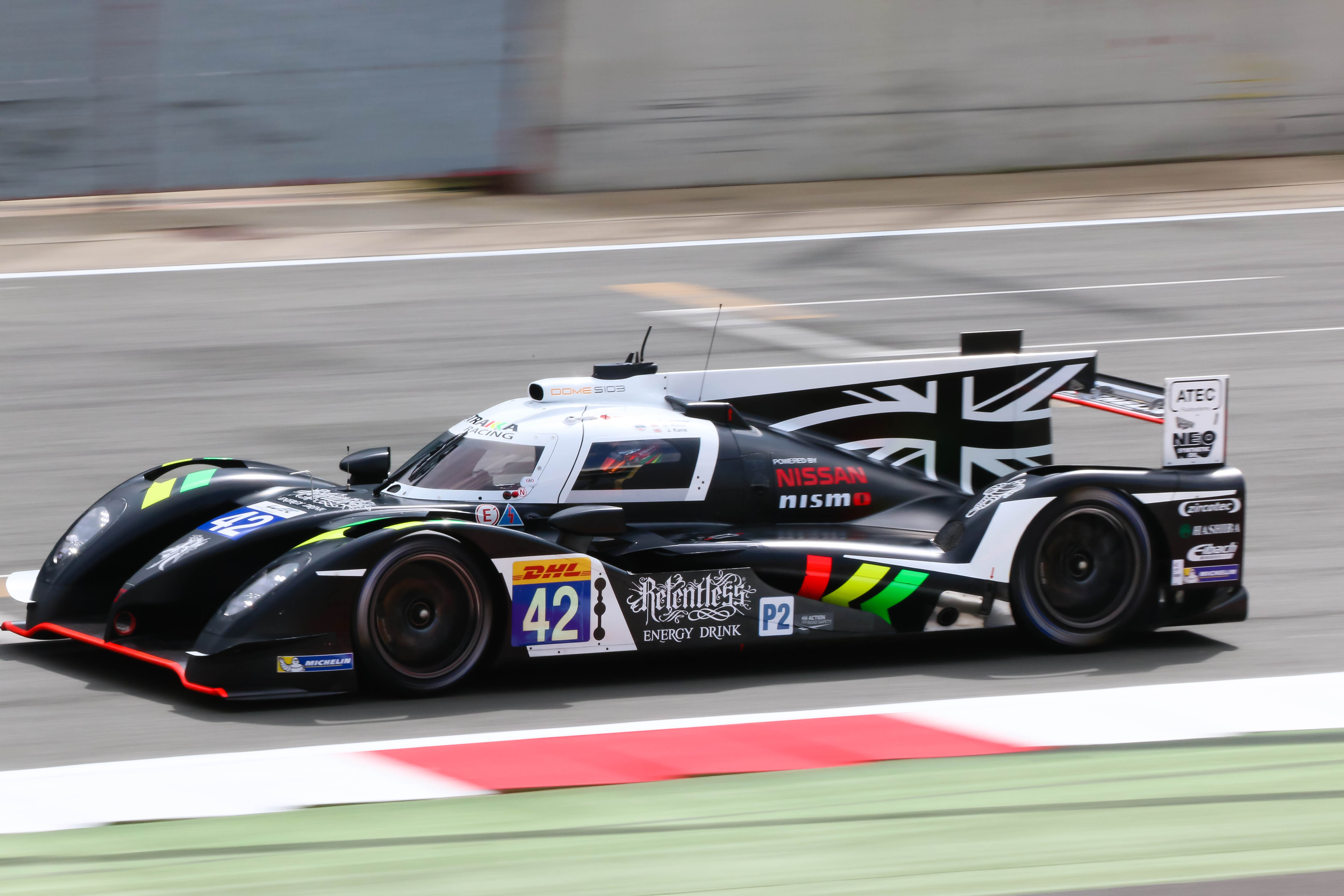 Dome S103 de Strakka Racing lors des 6 Heures de Silverstone 2015.